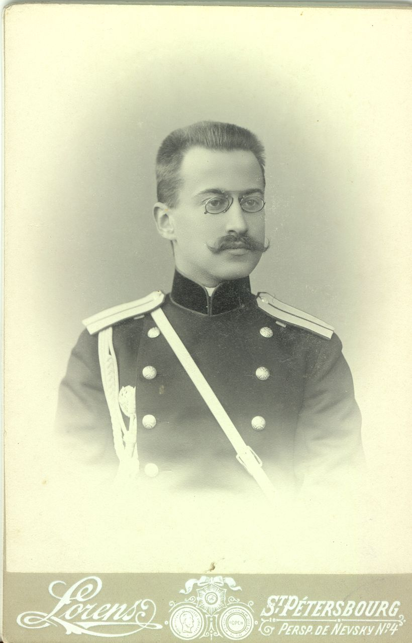 Новицкий Василий Федорович